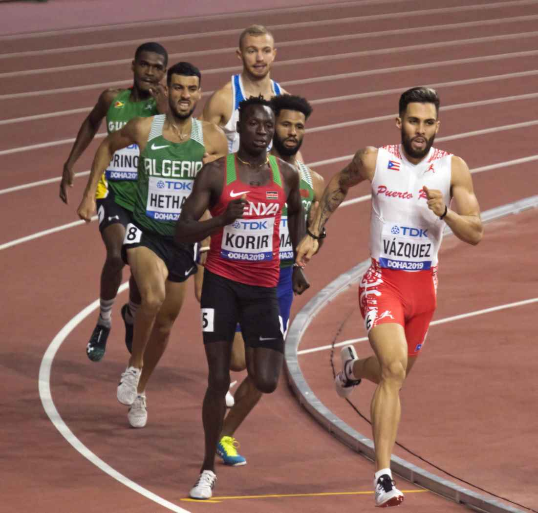 DOH20051 800m men heats vazquez